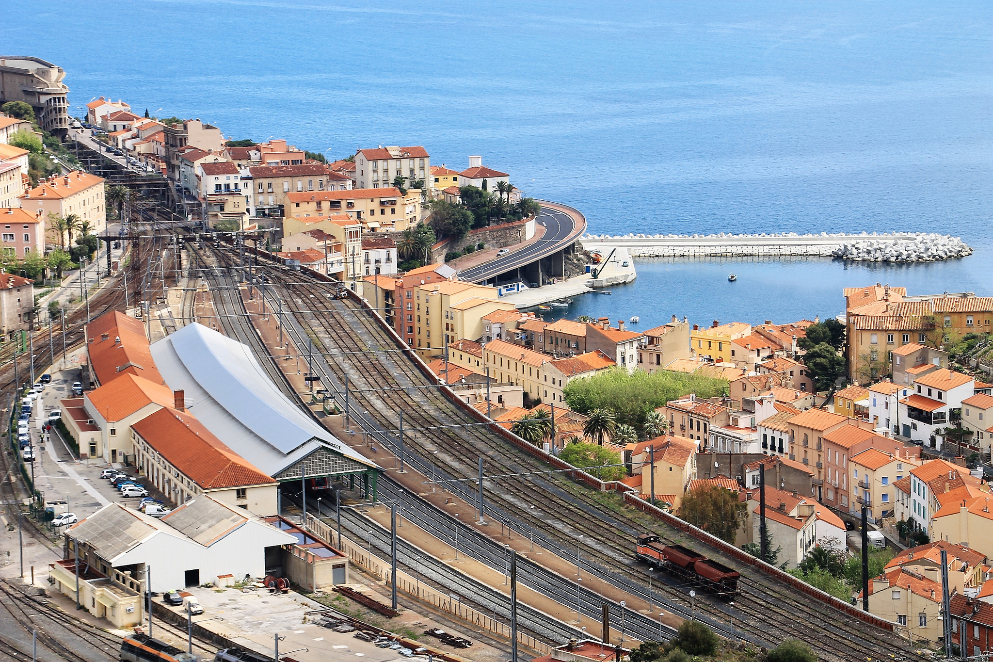 Estació de Cerbère.